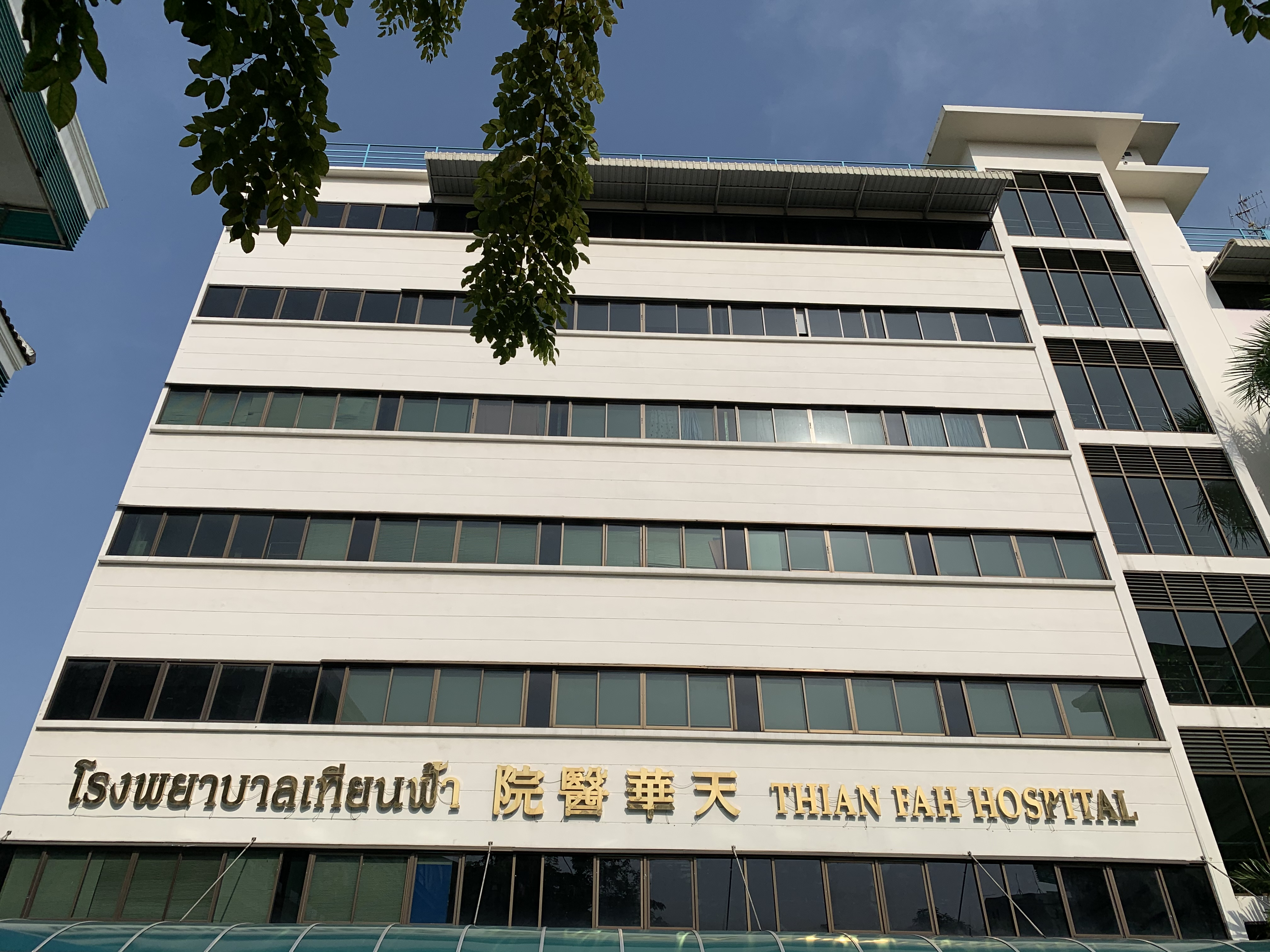 โรงพยาบาลเทียนฟ้า